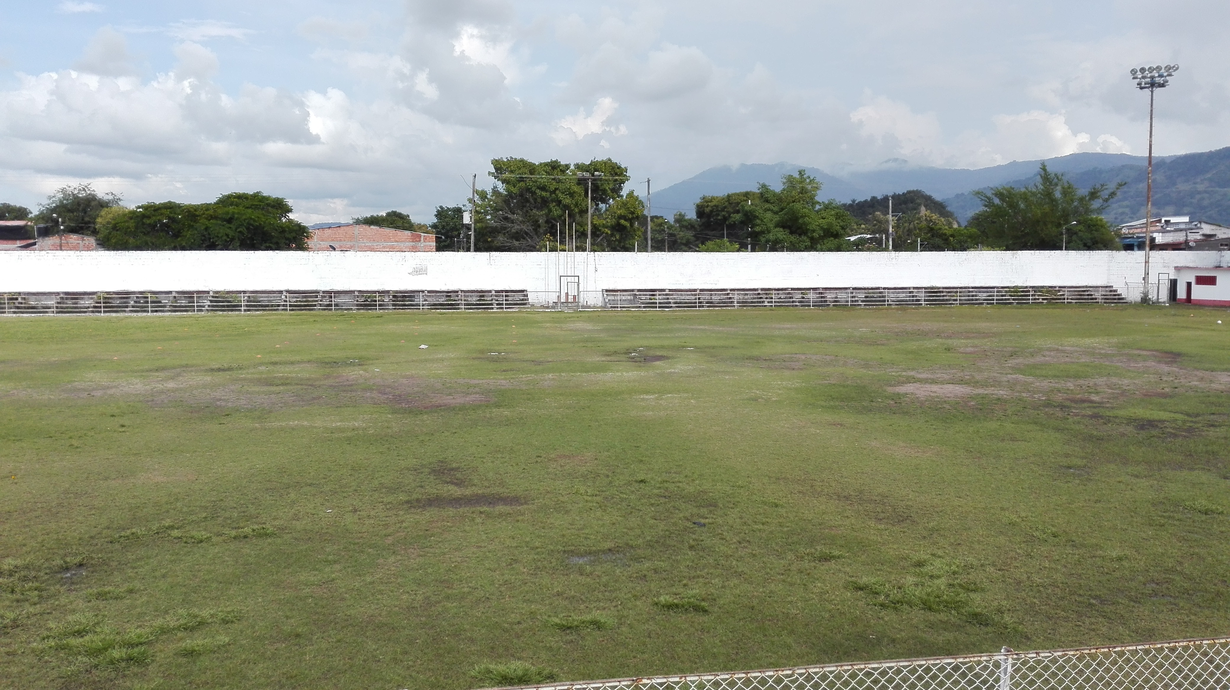 Estadio Municipal Los Alpes en el municipio de La Dorada, Caldas (Colombia).